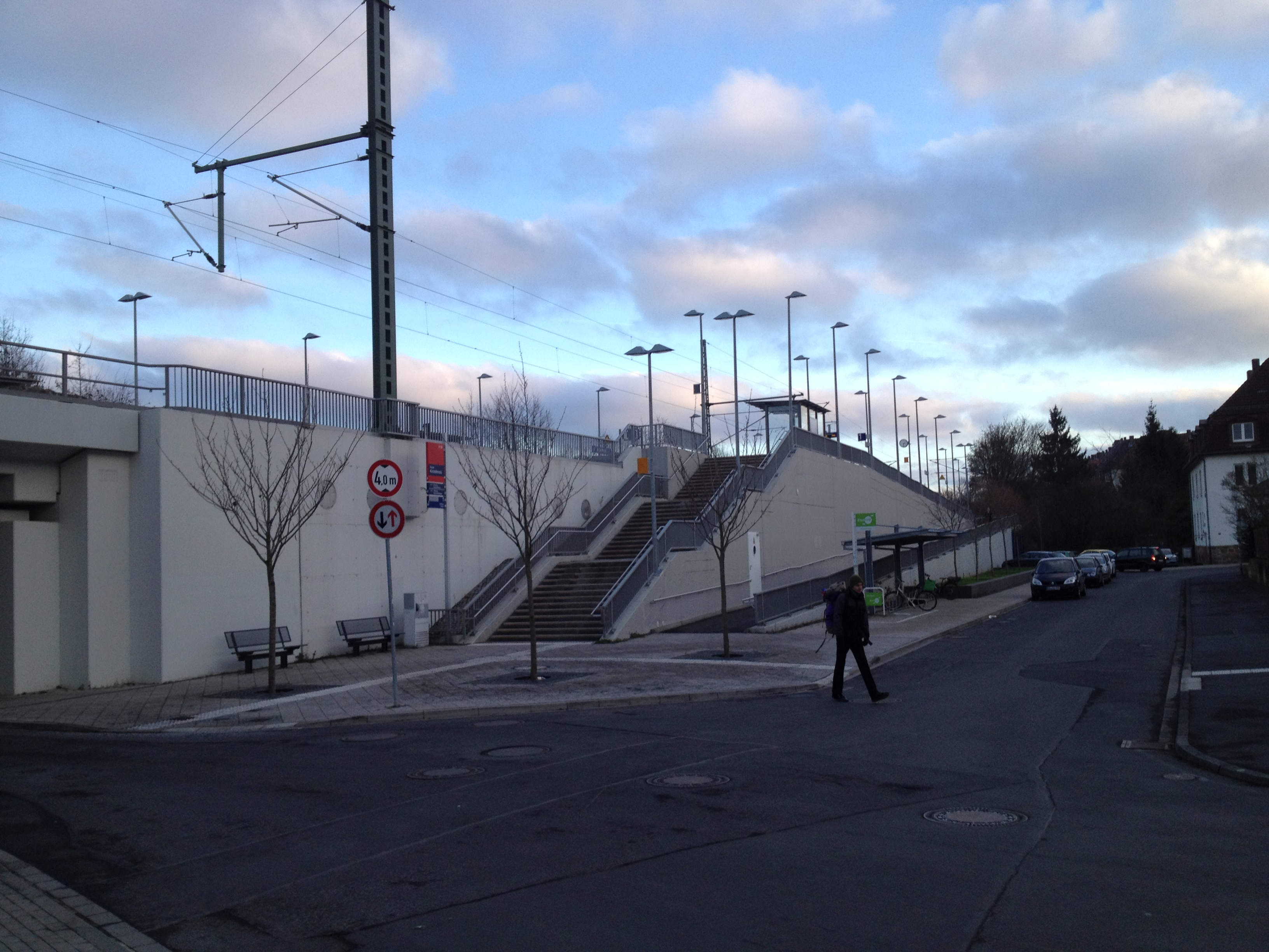 Der Vorplatz des Bahnhof Kirchditmoldes